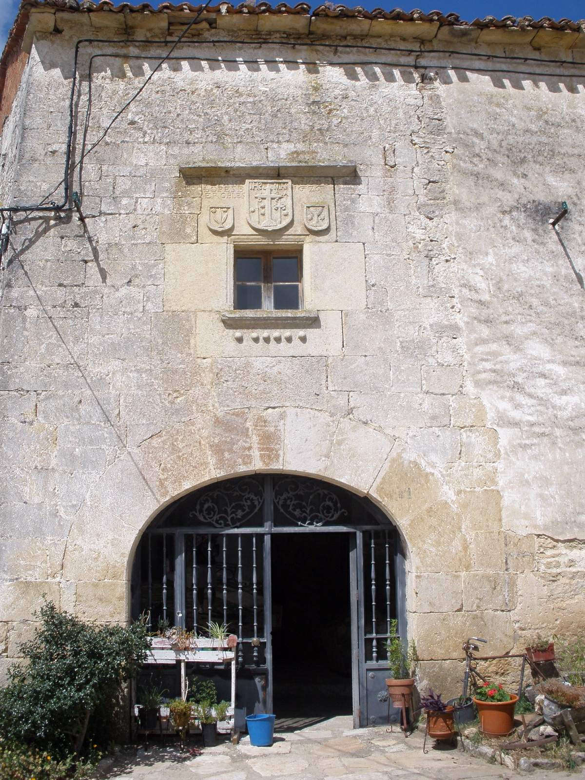 Arcellares. pedanía del municipio de Basconcillos del Tozo (Burgos)